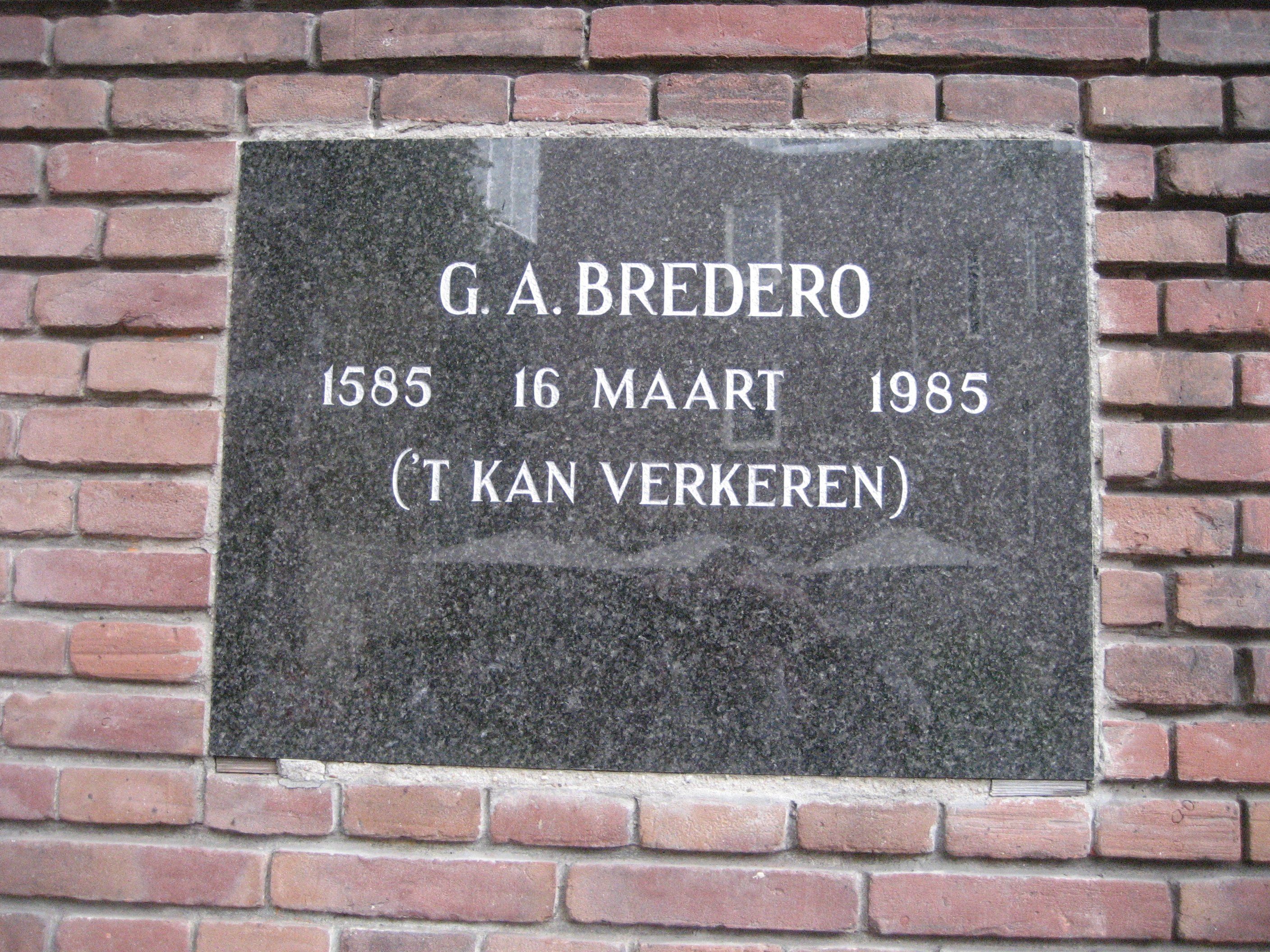 ('T KAN VERKEREN'). Motto van Bredero. Gevelsteen bij Warmoesstraat, Amsterdam (Nederland)